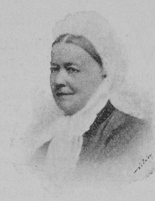 Hornjoserbsce: Portret Mile Imišoweje – serbska basnjerka.